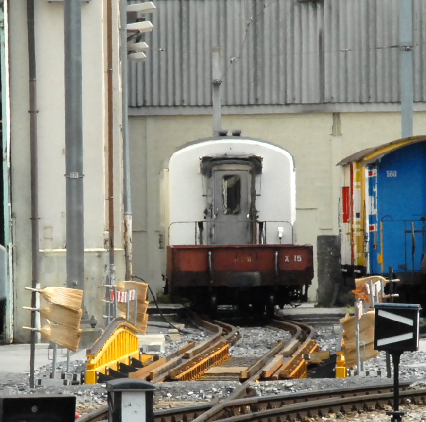 Omspoorinrichting Montreux-Berner Oberland-Bahn (MOB) te Montreux.